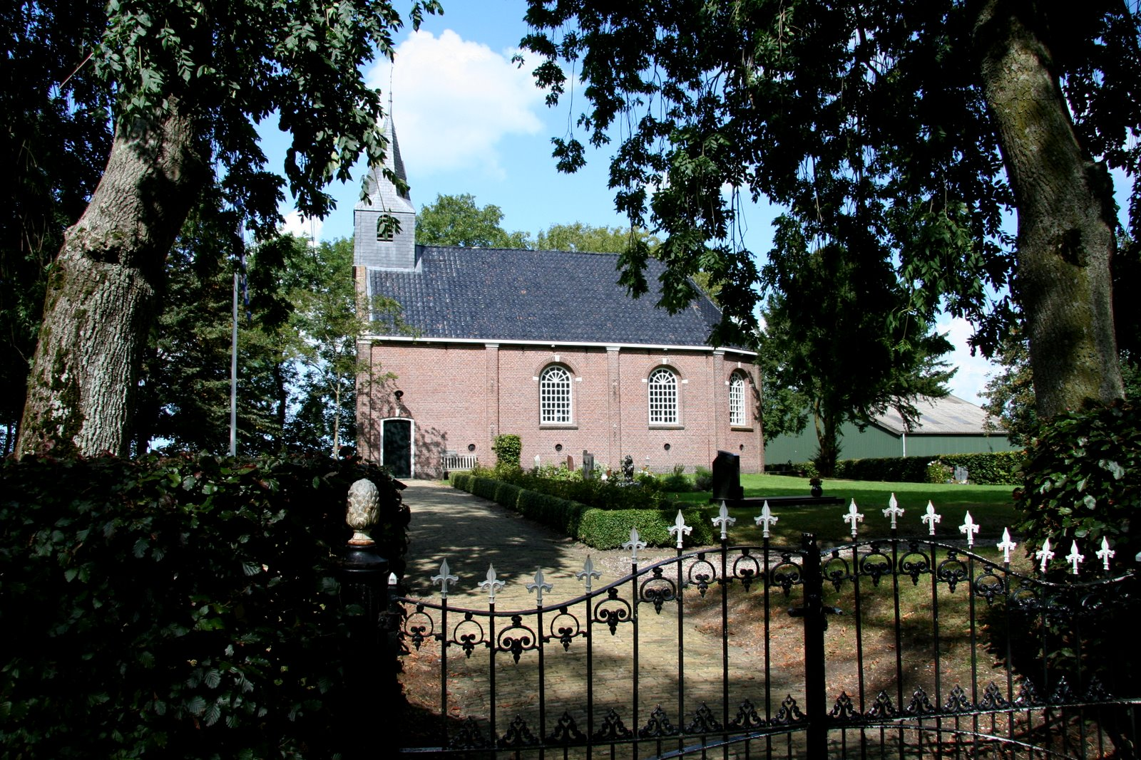 Kerkje Roodkerk